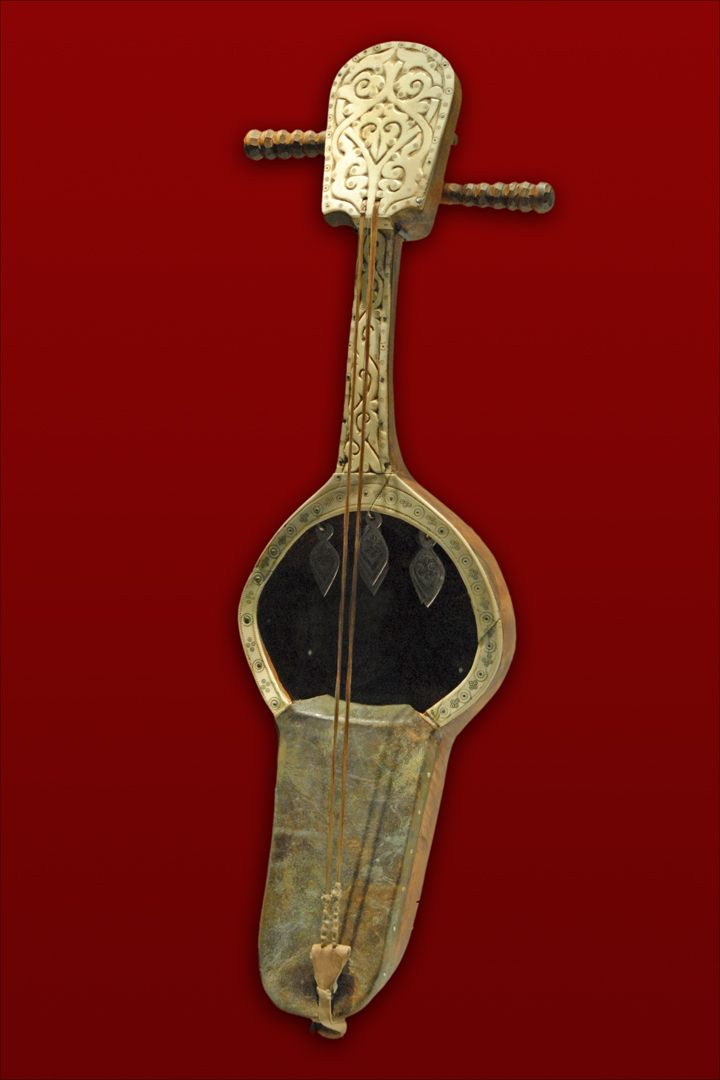 Kobyz facteur : Maître Louldavaev 1980 Bois, os, métal Almaty Le kobyz ou kopuz est un nom générique donné par les sociétés pastorales nomades des régions turco-mongoles à divers instruments de musique traditionnelle asiatique dont la vièle kyl-kobyz ou kyl kyyak ("kobyz ou kyyak à crin de cheval") des Kazakhs (extrait de Wikipedia) Objet présenté dans l'exposition « Kazakhstan Hommes, bêtes et dieux de la steppe » au Musée Guimet, musée national des arts asiatiques jusqu'au 31 janvier 2011 Cette petite exposition qui fait découvrir la culture du Kazakhstan est à ne pas manquer, elle se termine le 31 janvier 2011 ! Les objets en or sont de petites merveilles tout comme les objets utilisés dans les yourtes ou ceux qui servent à monter à cheval, la grande spécialité de ce peuple de nomades.